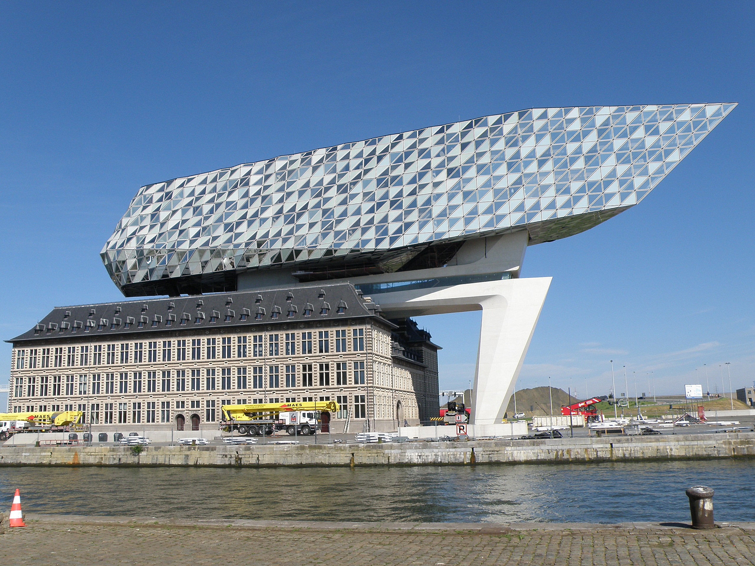 Antwerpen (België). Havenhuis, aan het Kattendijkdok.